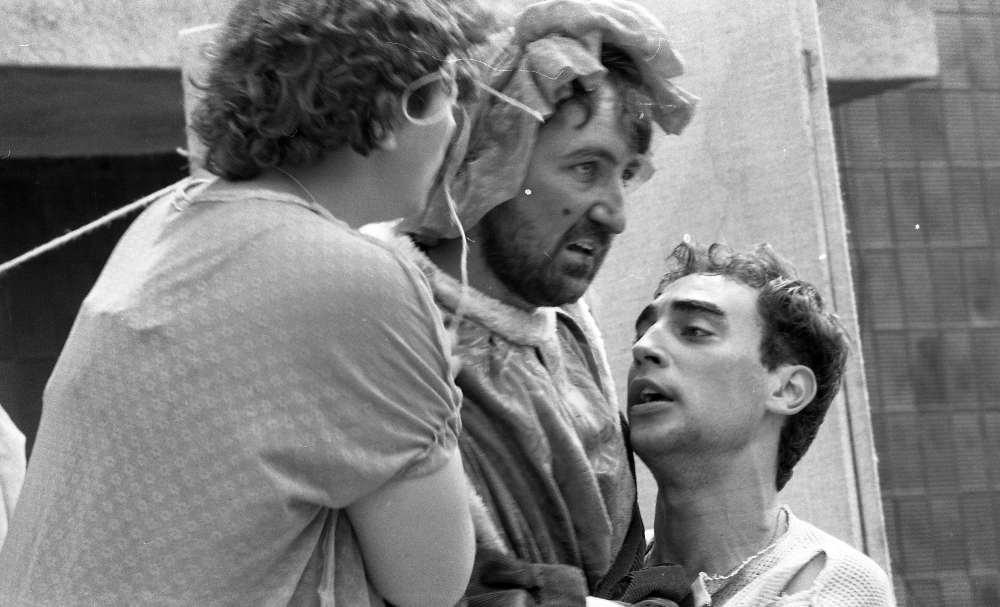 Kisbér a Tanyaszínház Panthelin mester című előadása, szemben Mikó István (Rőfös) és Kulka János fh.